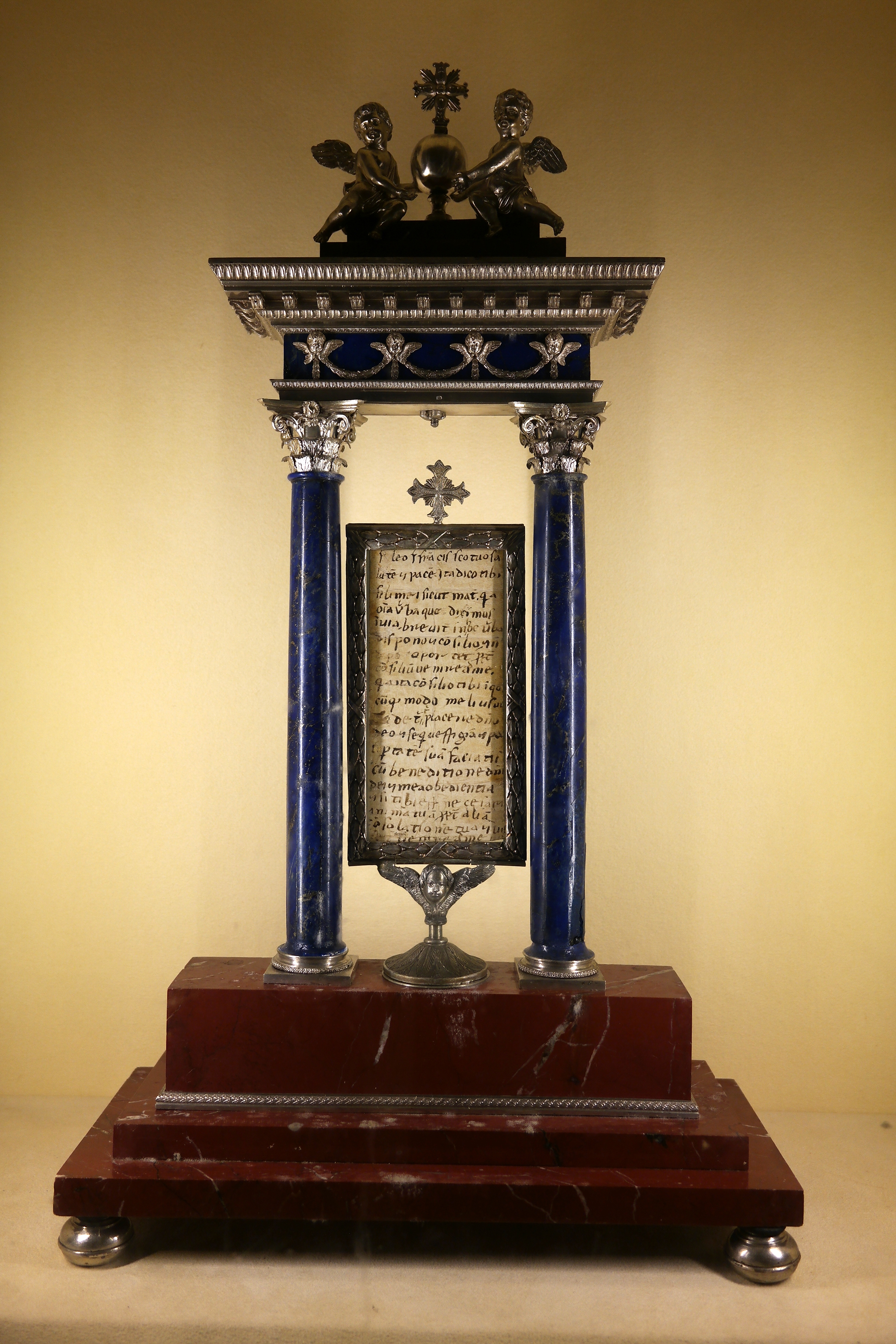 Lettera autografata da San Francesco all'interno del Duomo di Spoleto